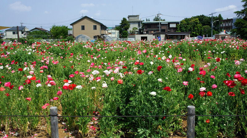 花と緑の広場 2013.05.26 13:25